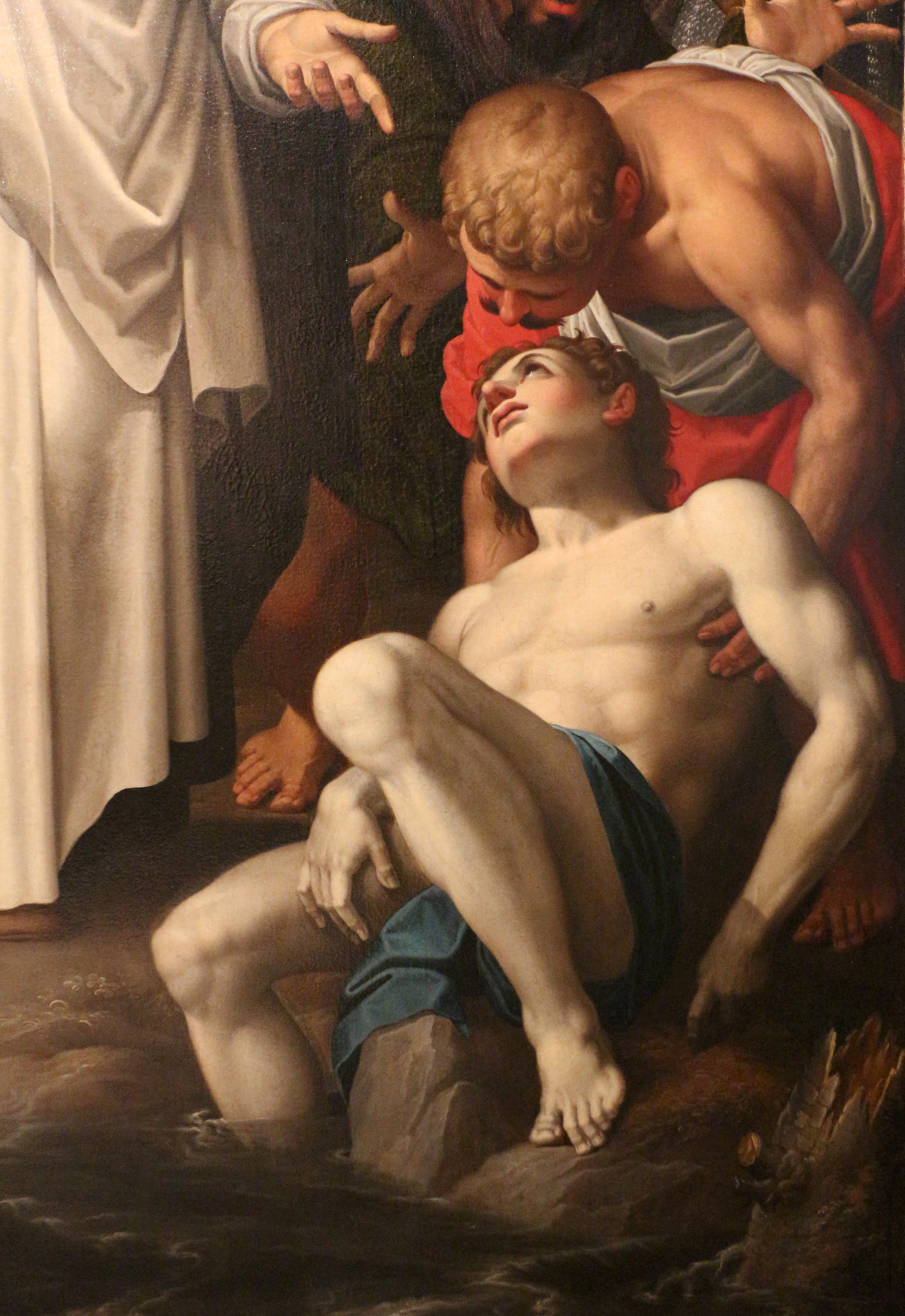 detail